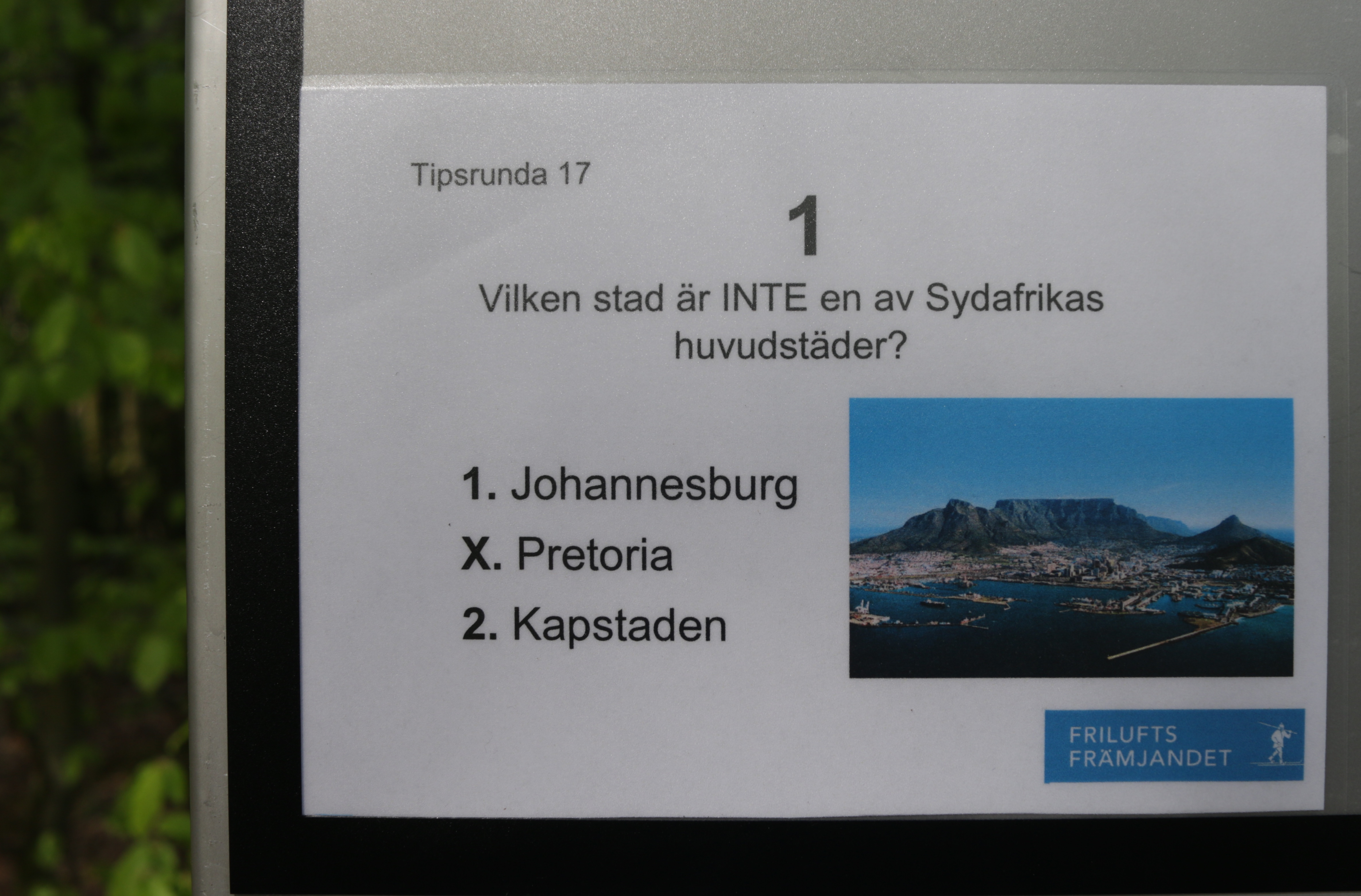 Tipspromenadfråga